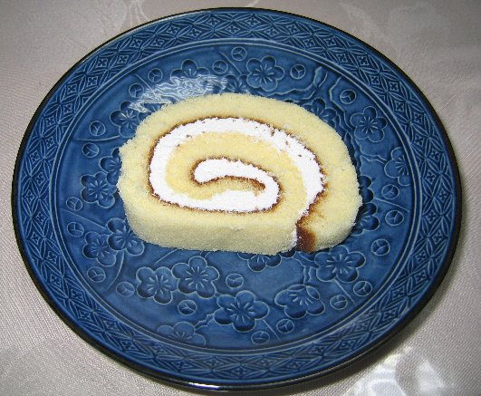 スイスロール切り身